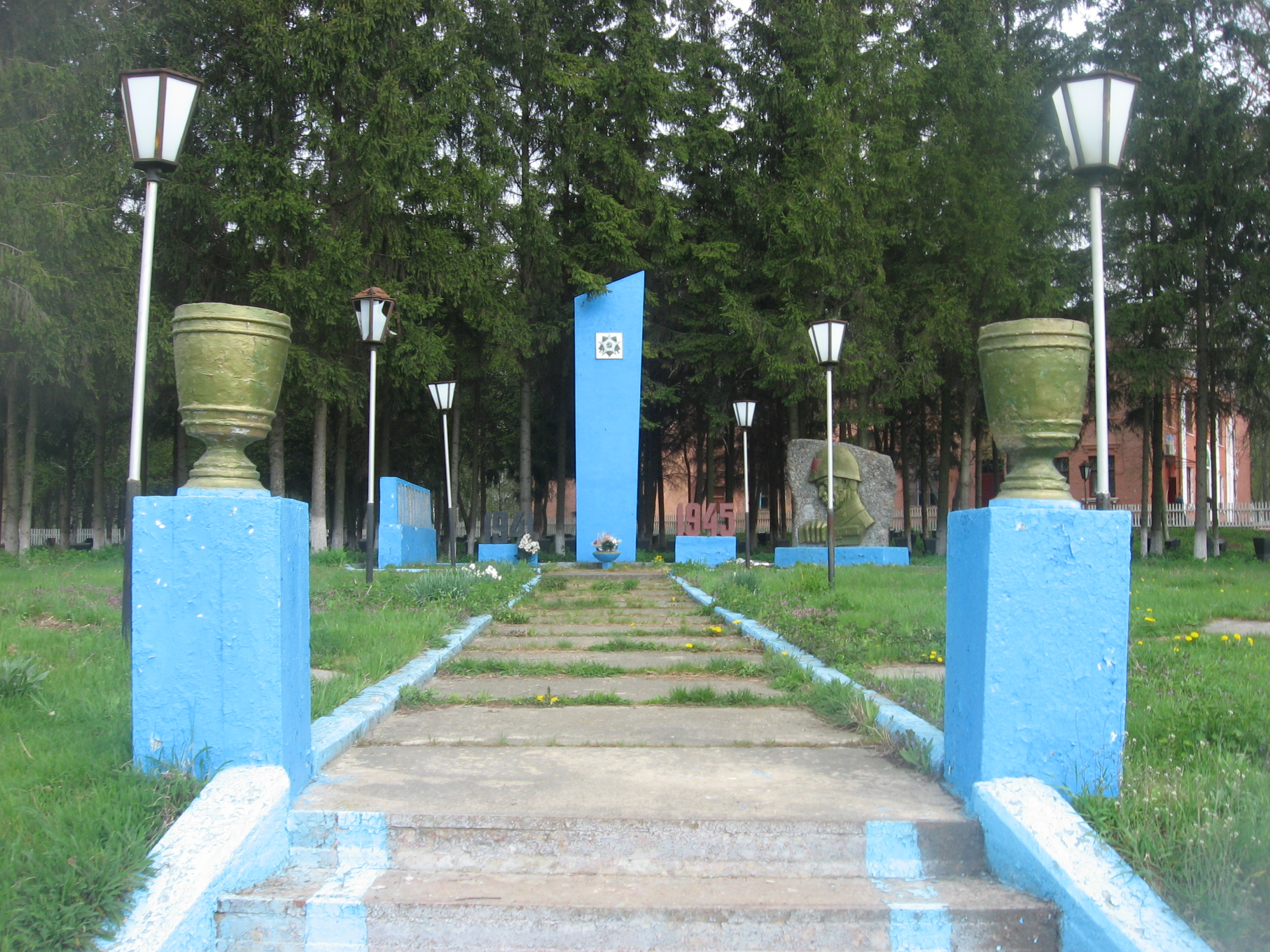 Пам’ятник 262 воїнам – односельчанам,загиблим на фронтах ВВВ. Село Чернявка